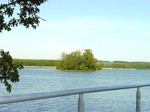 Der See „Die Lieps“ in Mecklenburg mit der Insel Kietzwerder